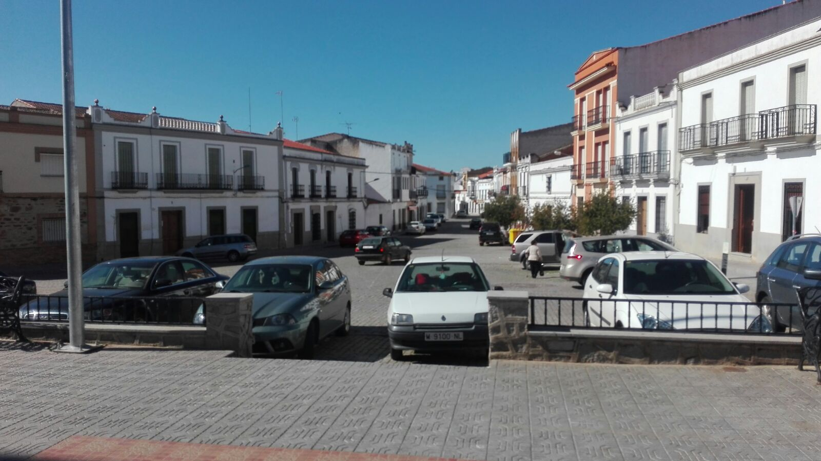 Iglesia parroquial de La Purísima Concepción.